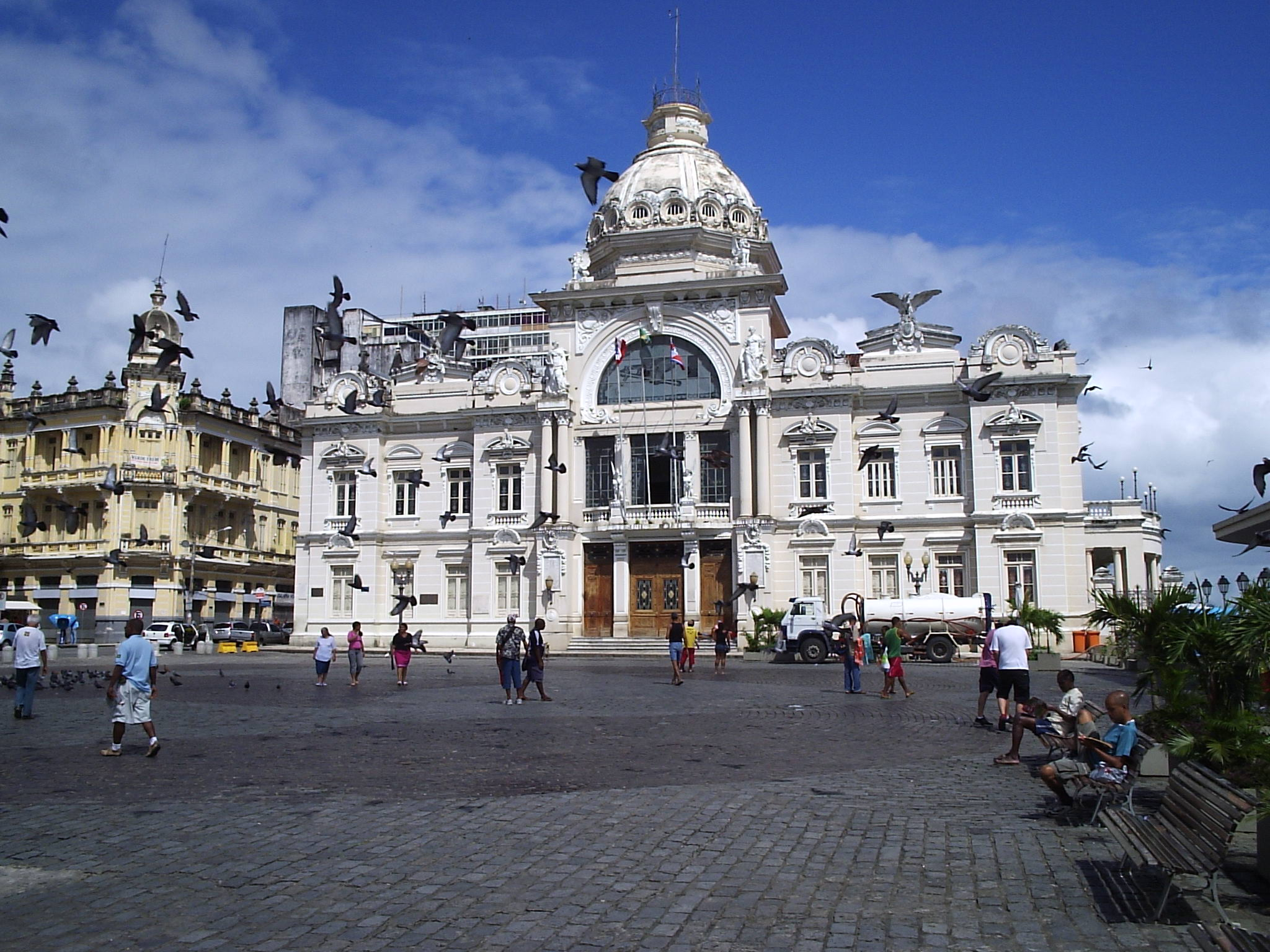 The former State's Government palace. Photografed by User:Sitenl Só por motivo de ratificação essa imagem não do Palácio da Aclamação e sim do Palácio Rio Branco que fica na praça Tomé de Souza em frente ao Elevador Lacerda. Também foi sede do Governo da Bahia.